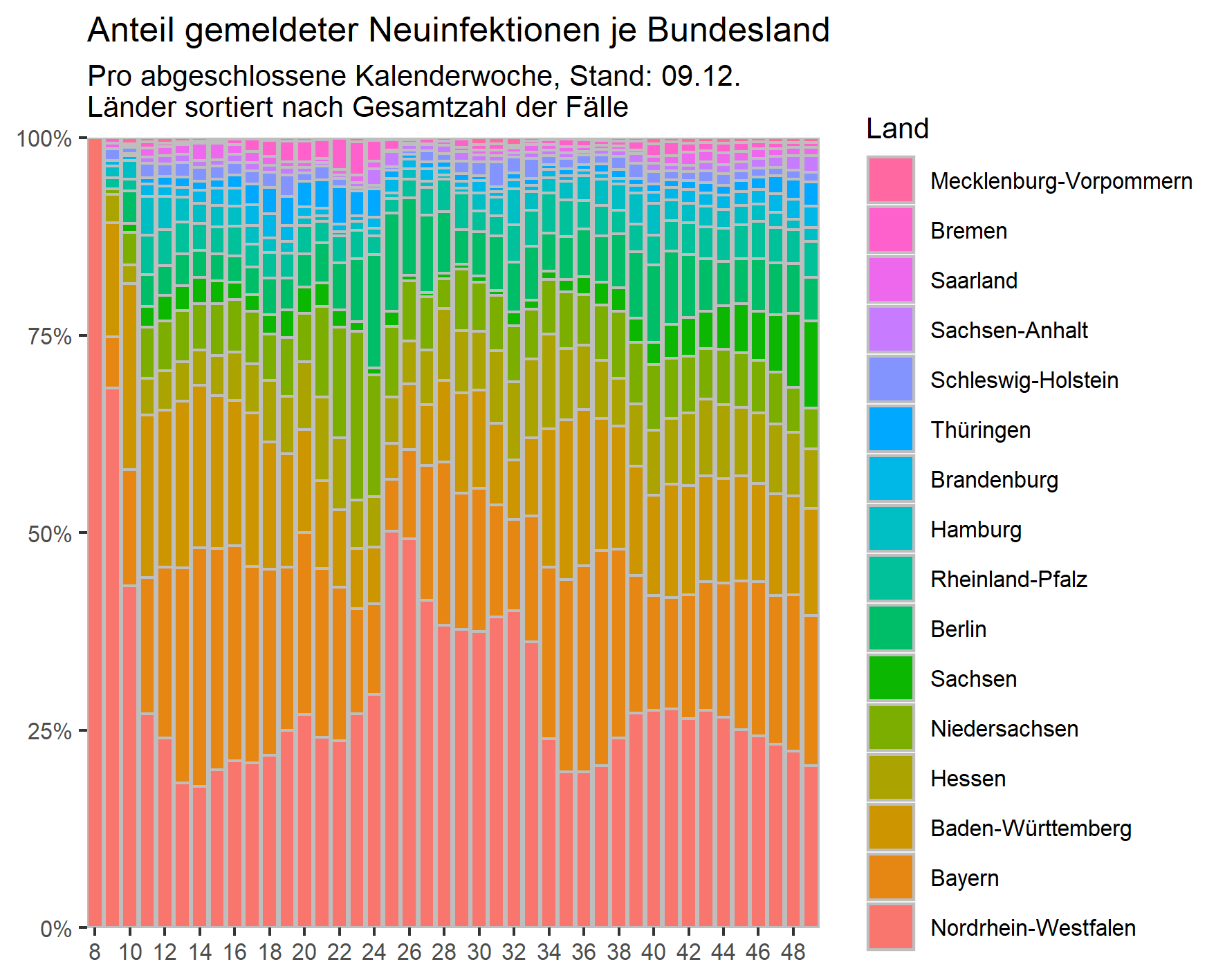 Anteil der neu gemeldeten Covid-19-Infektionen je Bundesland pro abgeschlossene Kalenderwoche. Erstellt mit R / ggplot.